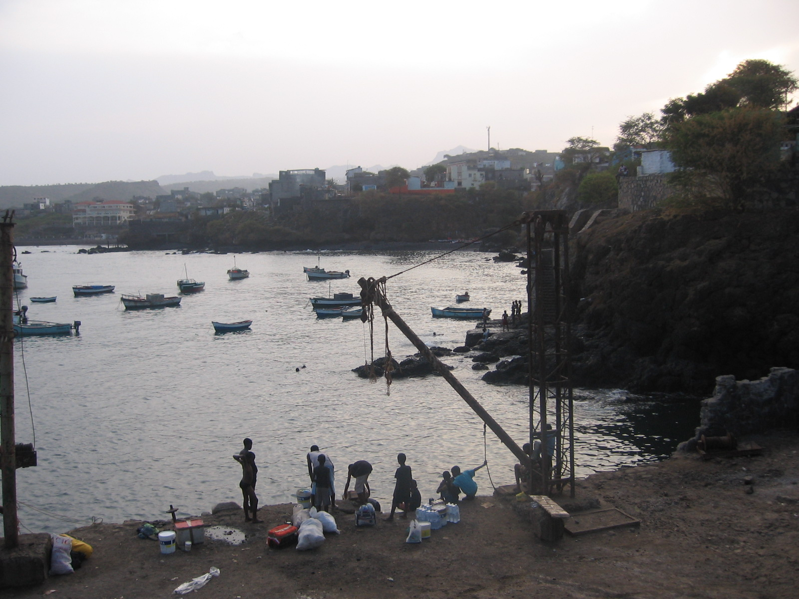 Porto de Pedra Badejo, ilha de Santiago, Cabo Verde